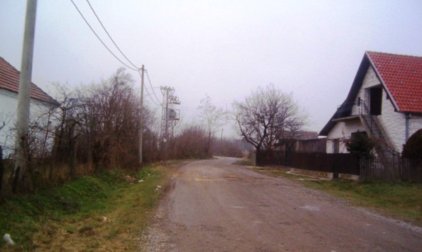 Кршна Глава.